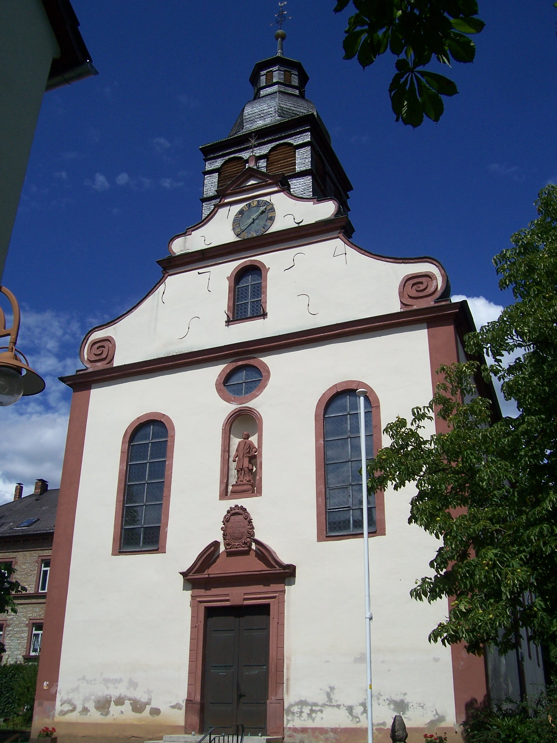 St. Laurentius in Dittwar (Tauberbischofsheim), erbaut 1748-1752.